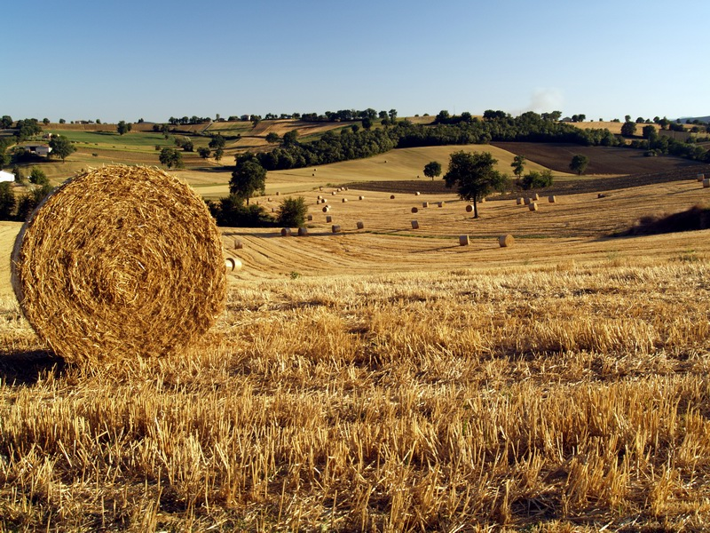 Campi umbri e rotoballe di fieno.